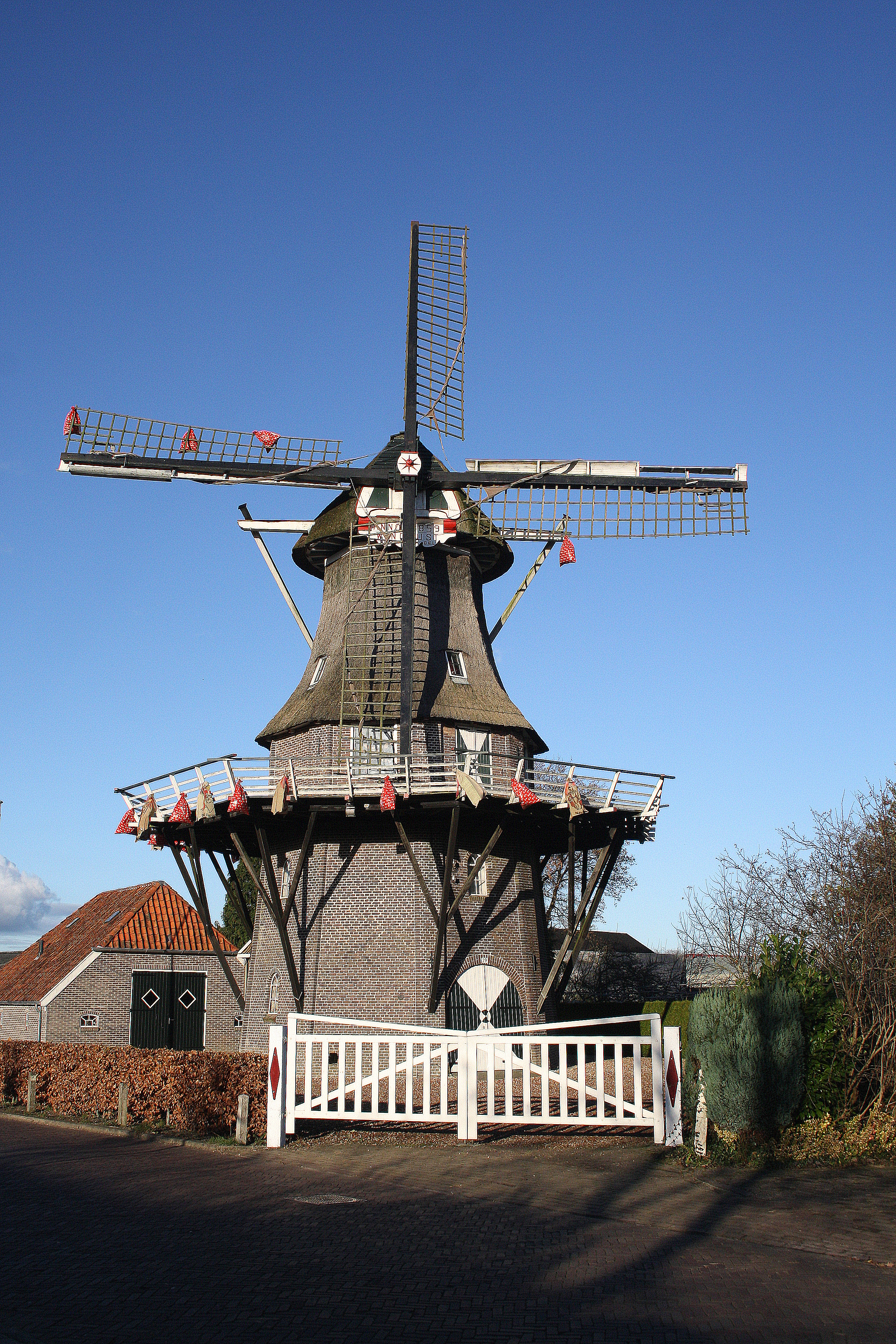 Noordwolde - molen Windlust - Anno 1859 - Industrieweg Noordwolde - korenmolen